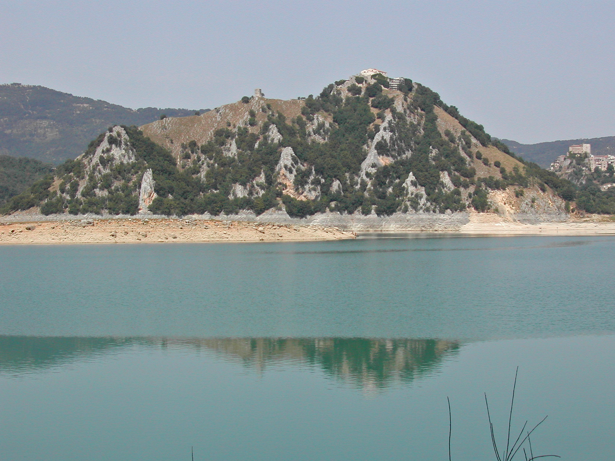 /*not abruzzo but lazio*/